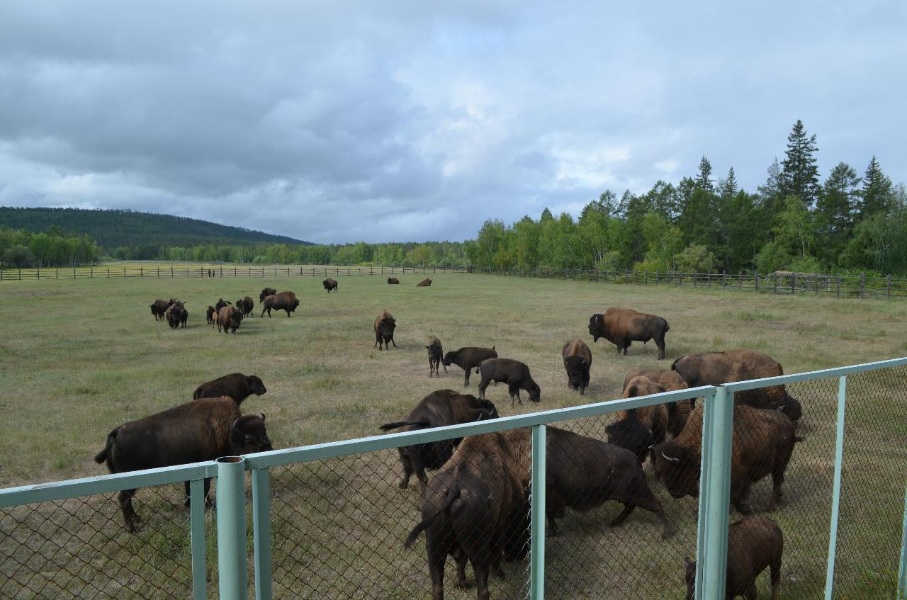 В Усть-Буотамском заповеднике, Хангаласский район, Якутия